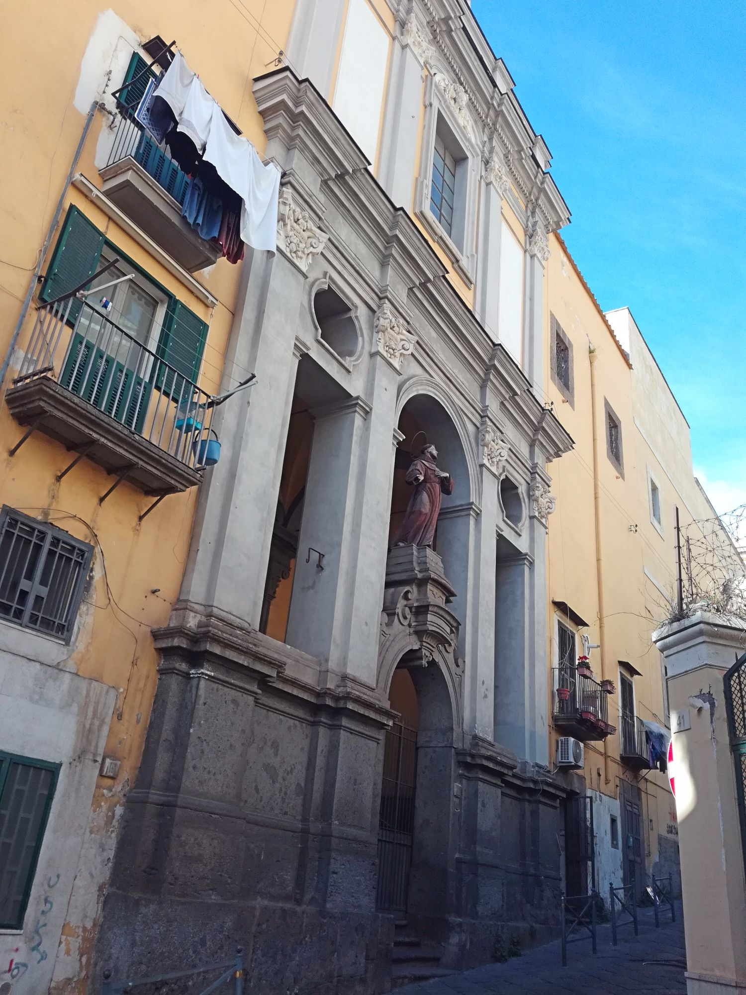 La chiesa del Complesso di San Francesco degli Scarioni